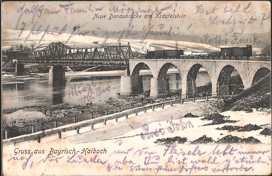 Schwarzweißfoto der damals Neuen Donaubrücke am Kräutelstein (Eisenbahnbrücke) vom rechten Donauufer (Bayerisch-Haibach) aus, flussabwärts gesehen